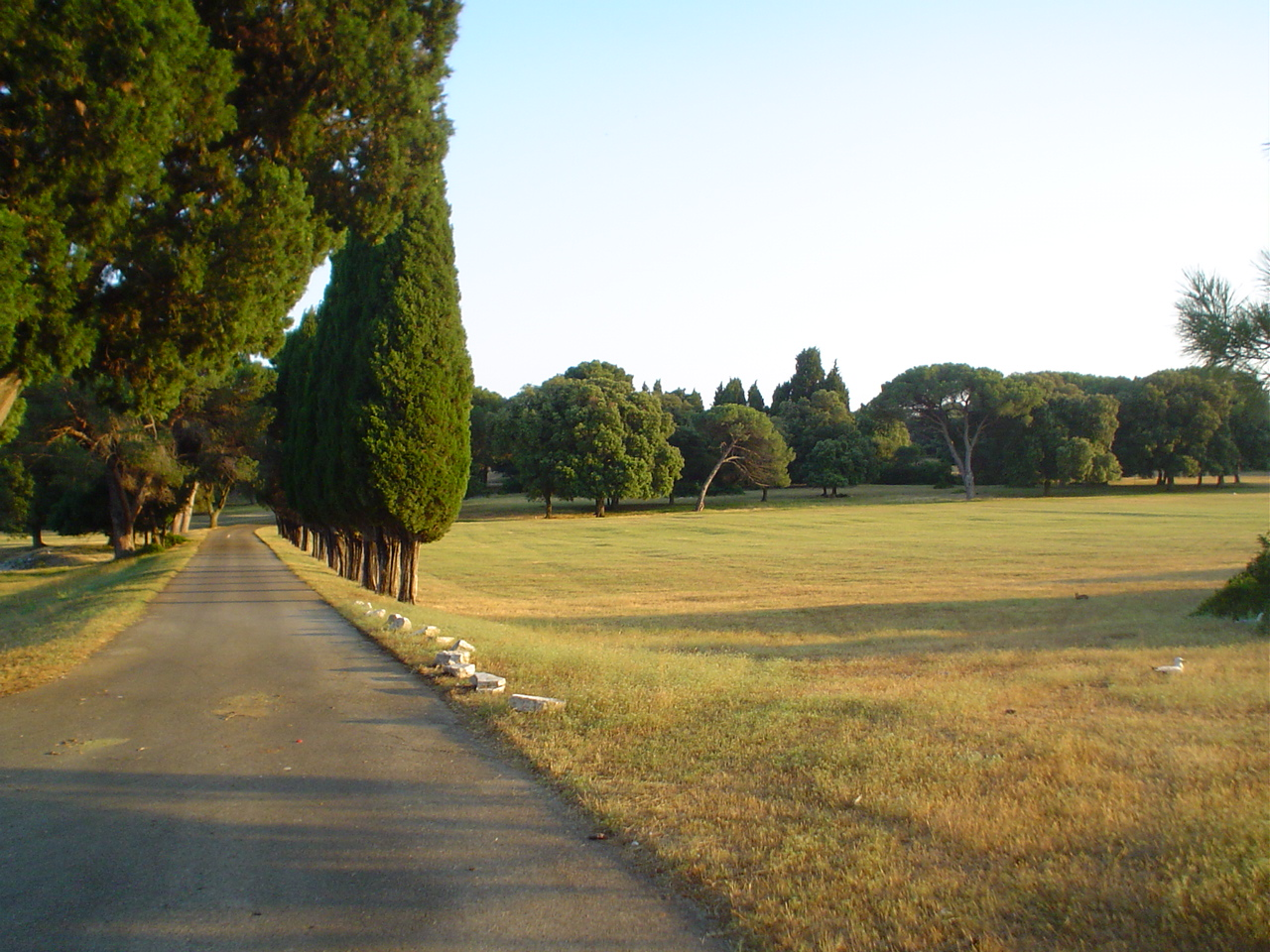 Brijuni - Natural